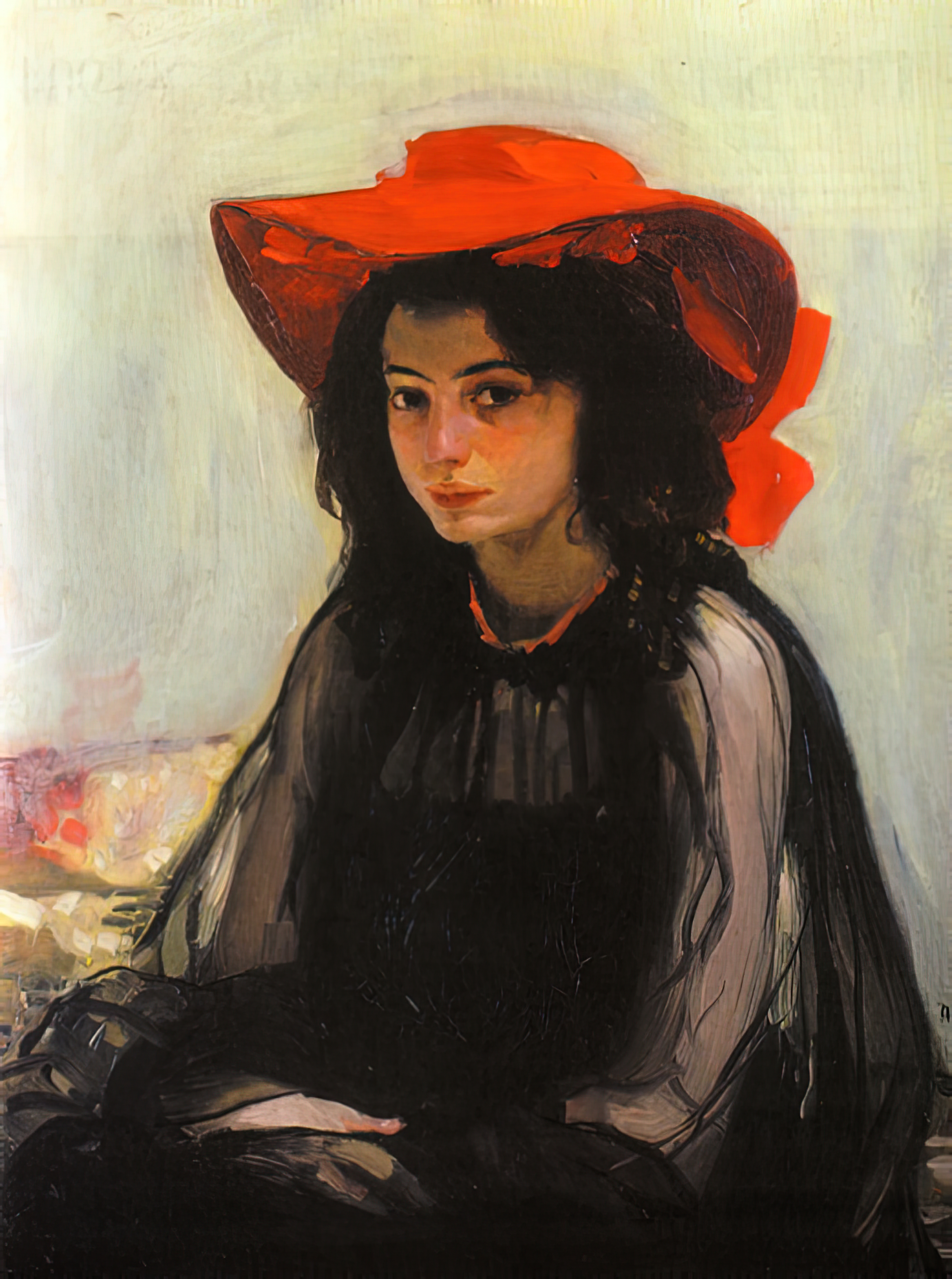 Ukrainian: 1Дівчина в червонім капелюсіtitle QS:P1476,uk:"1Дівчина в червонім капелюсі" label QS:Luk,"1Дівчина в червонім капелюсі"